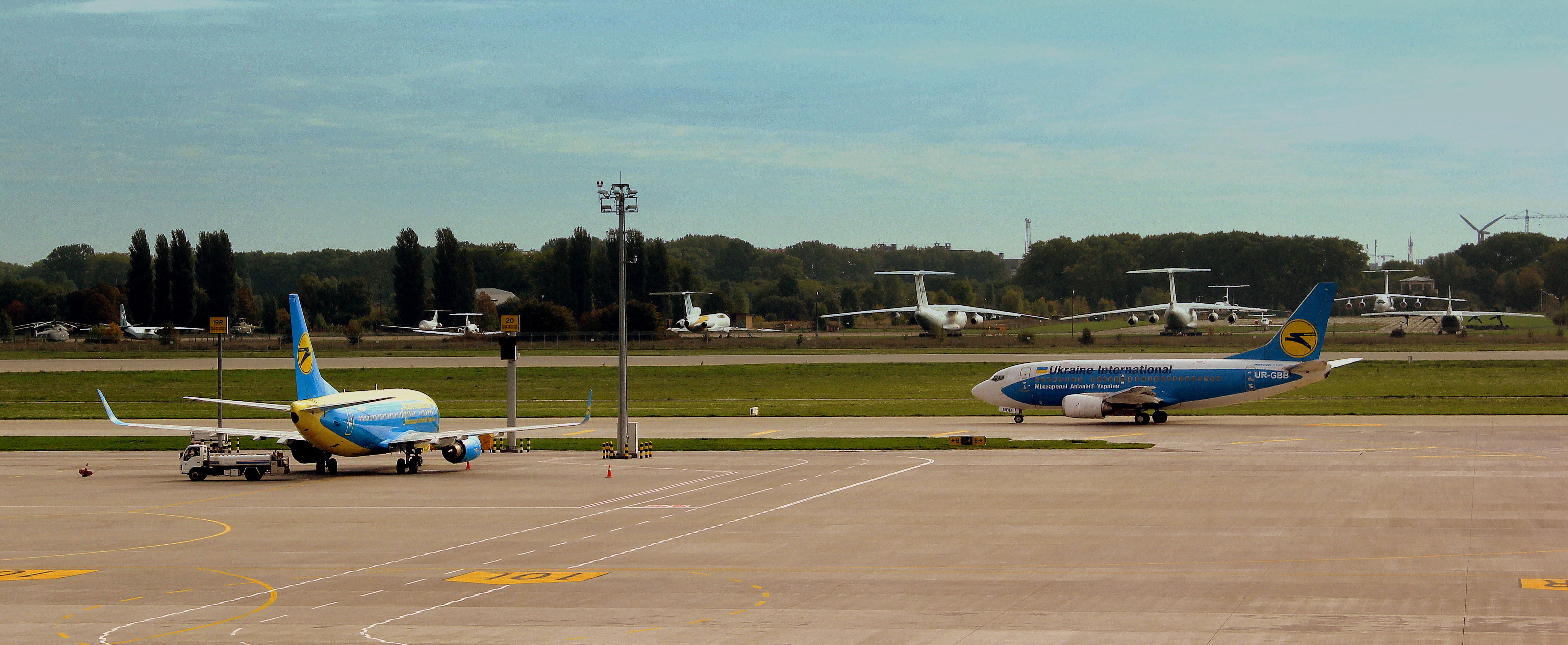 BORYSPIL AIRPORT KIEV SEP 2013